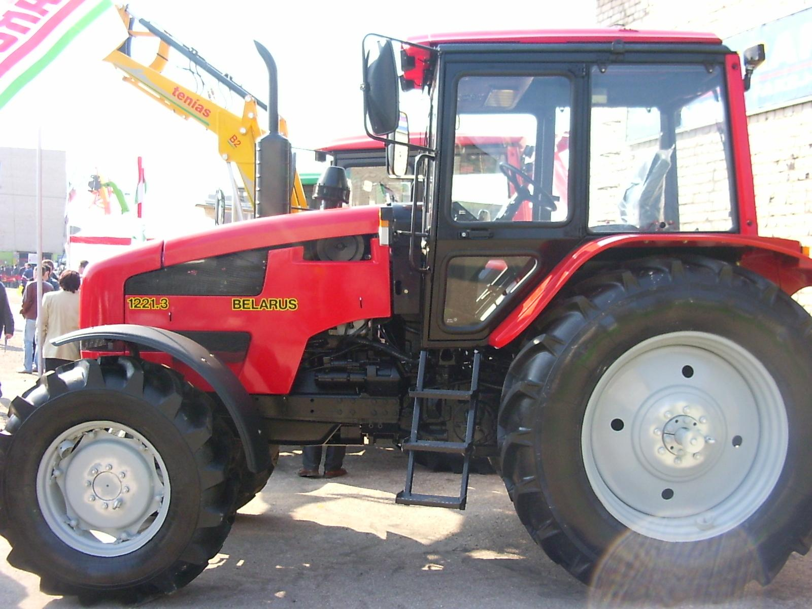 Belarus 1221.3